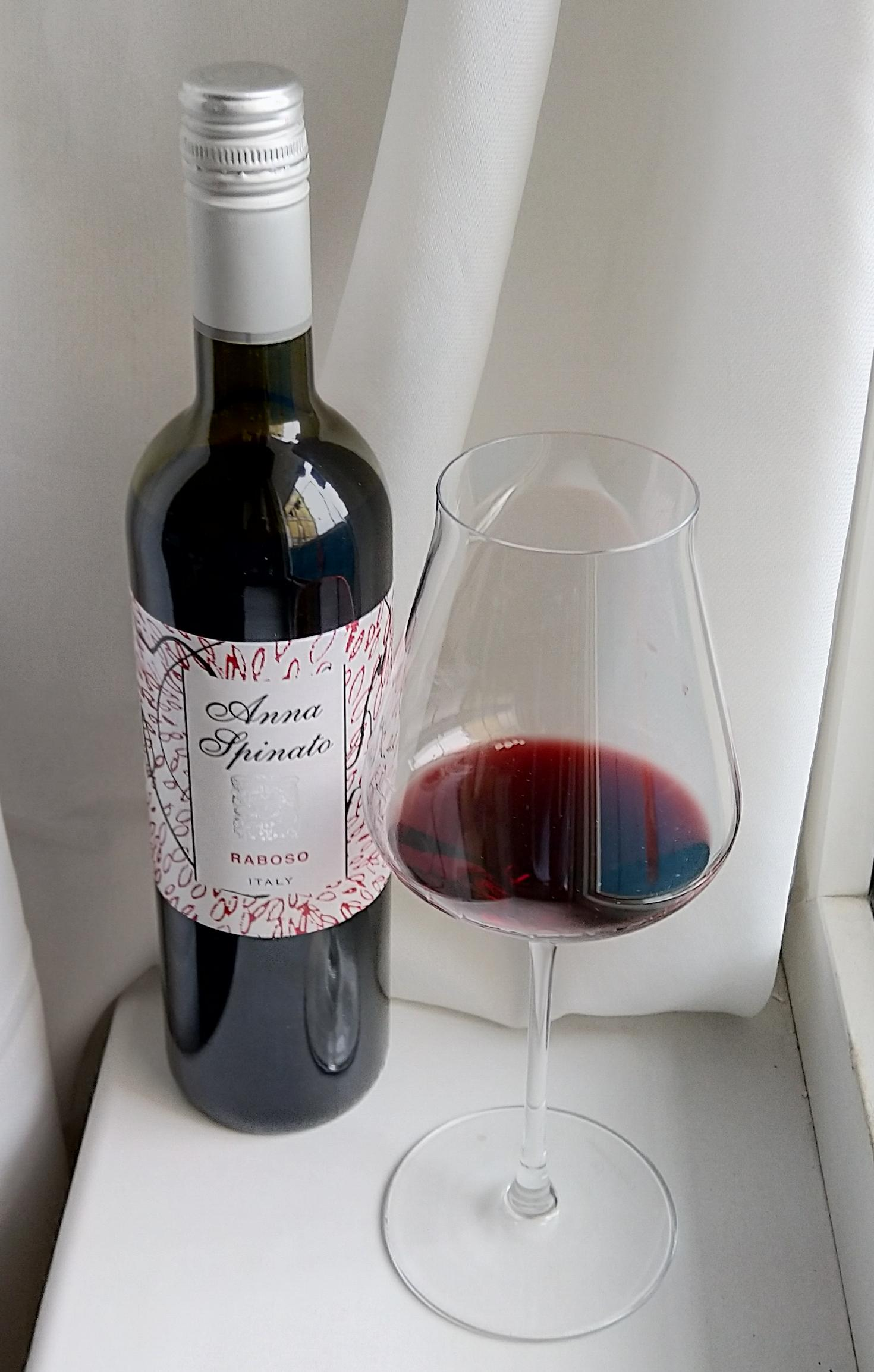 Raboso wines